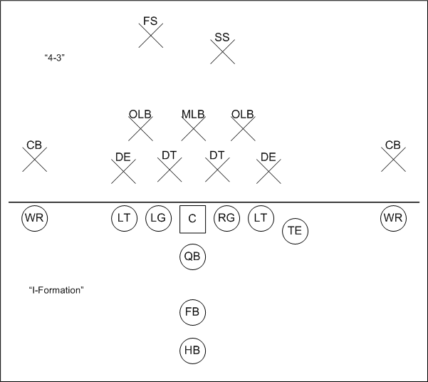 creado pelo Megamemnon